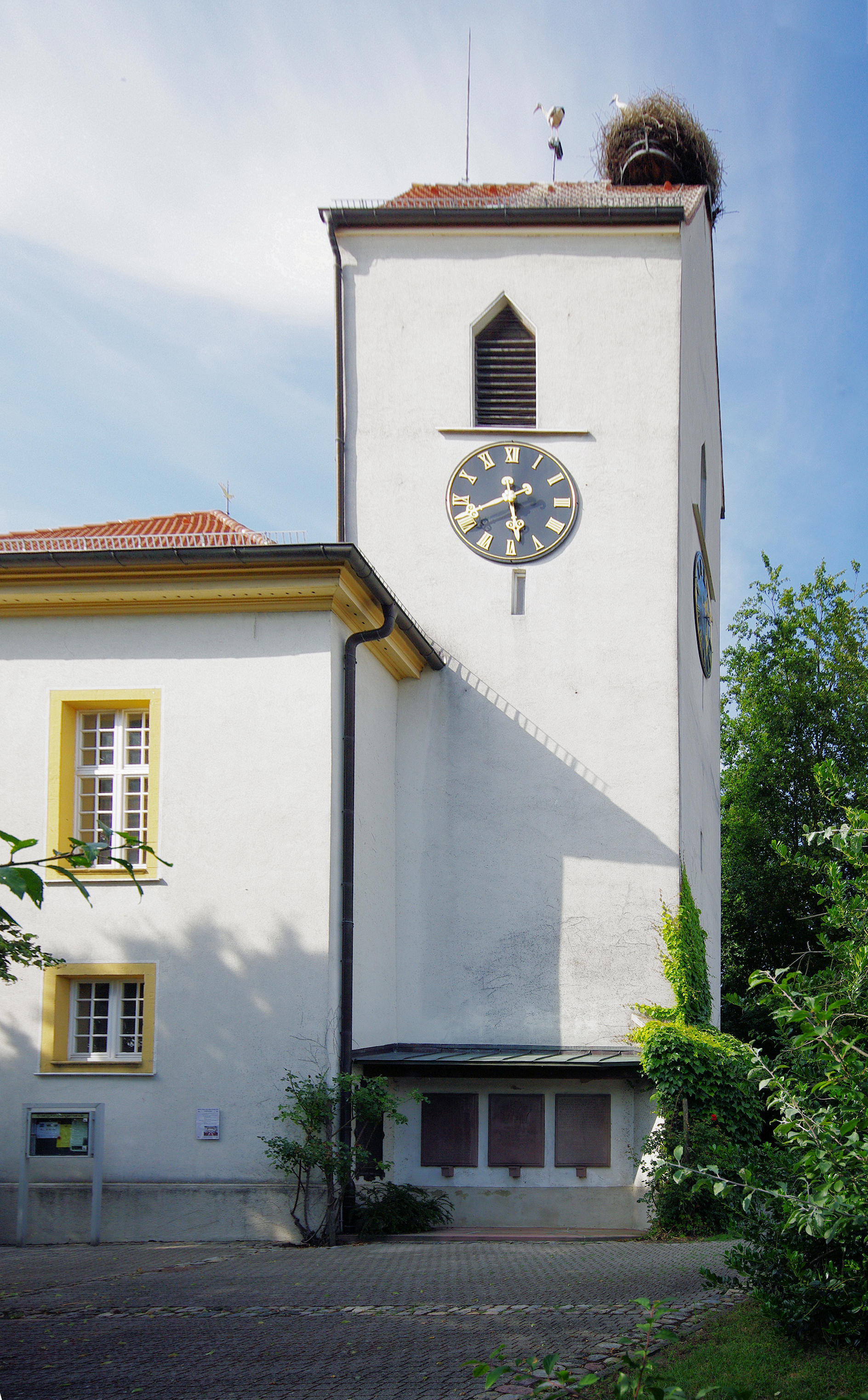 Historische Bergkirche Opfingen (1778) Der Turm mit Störchen